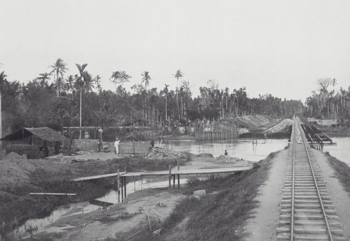 foto. De Atjeh-spoorlijn bij Blang Me